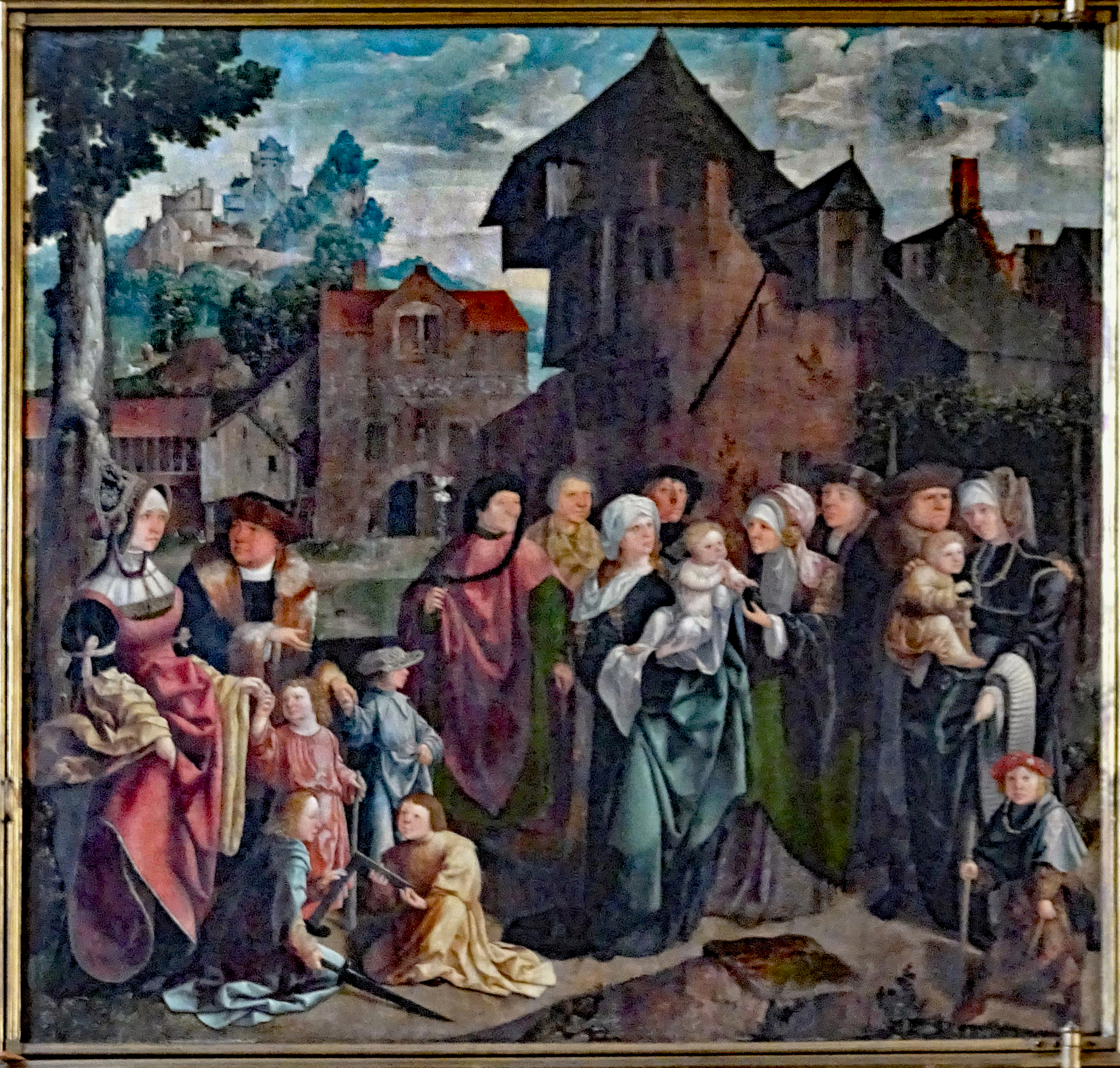 Pfarrkirche St. Martin (Obervellach), die Heilige Sippe: Altargemälde von Jan van Scorel